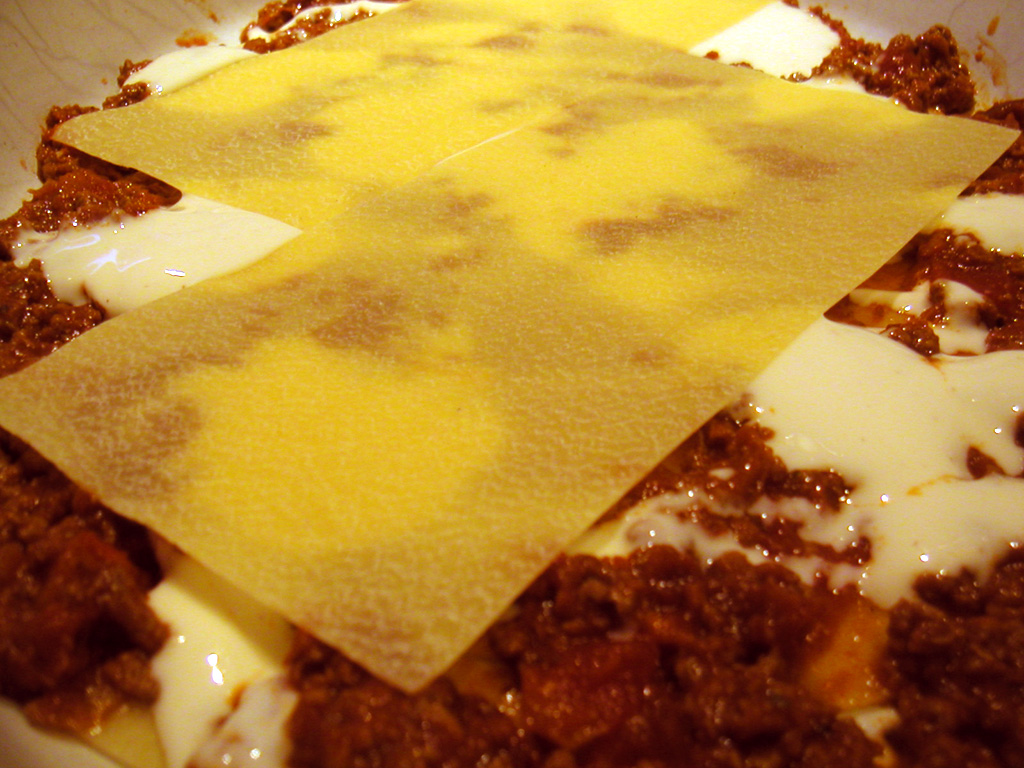 Lasagne